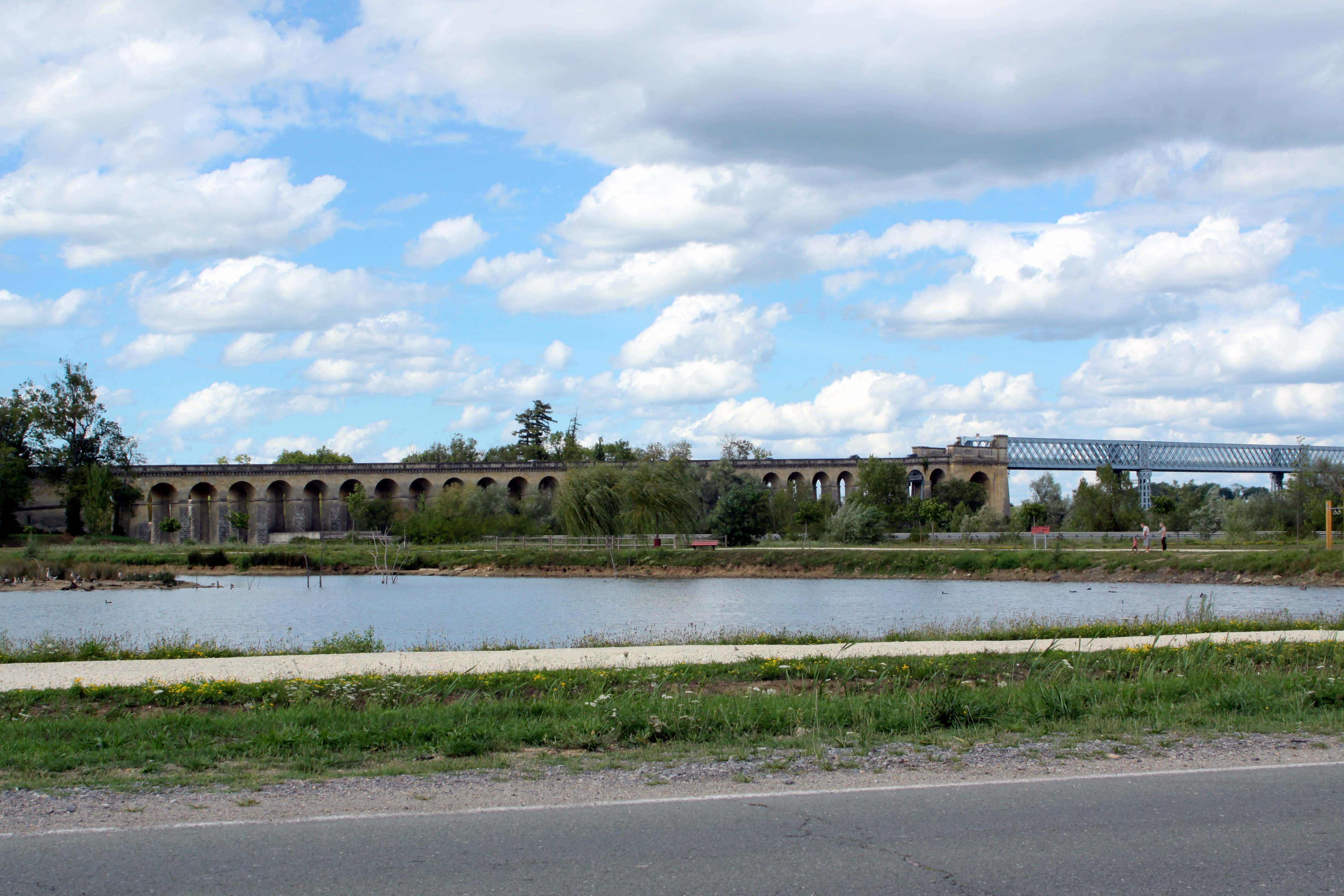 Pont de Cubzac. Rampe rive gauche.